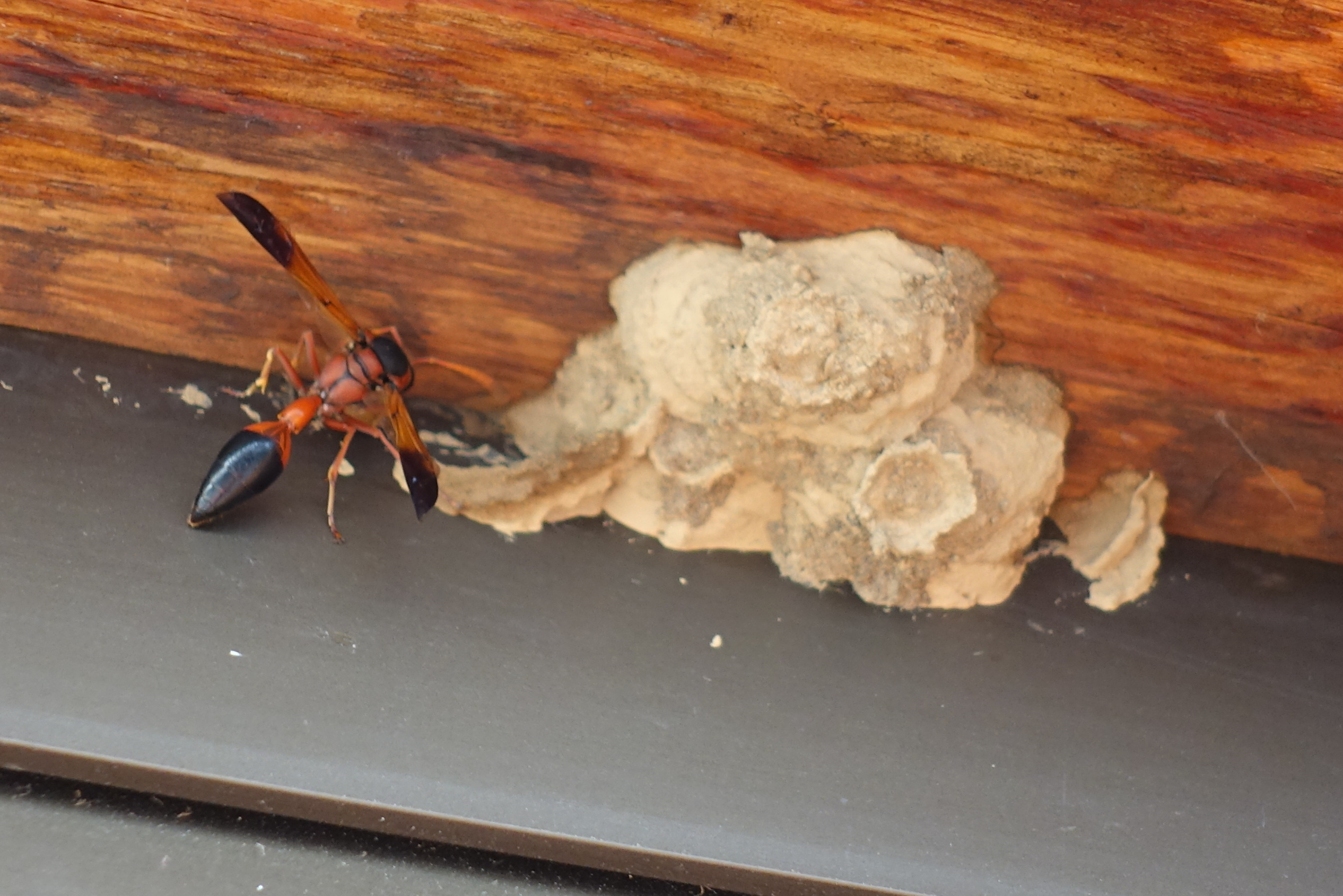 Delta dimidiatipenne El Hierro